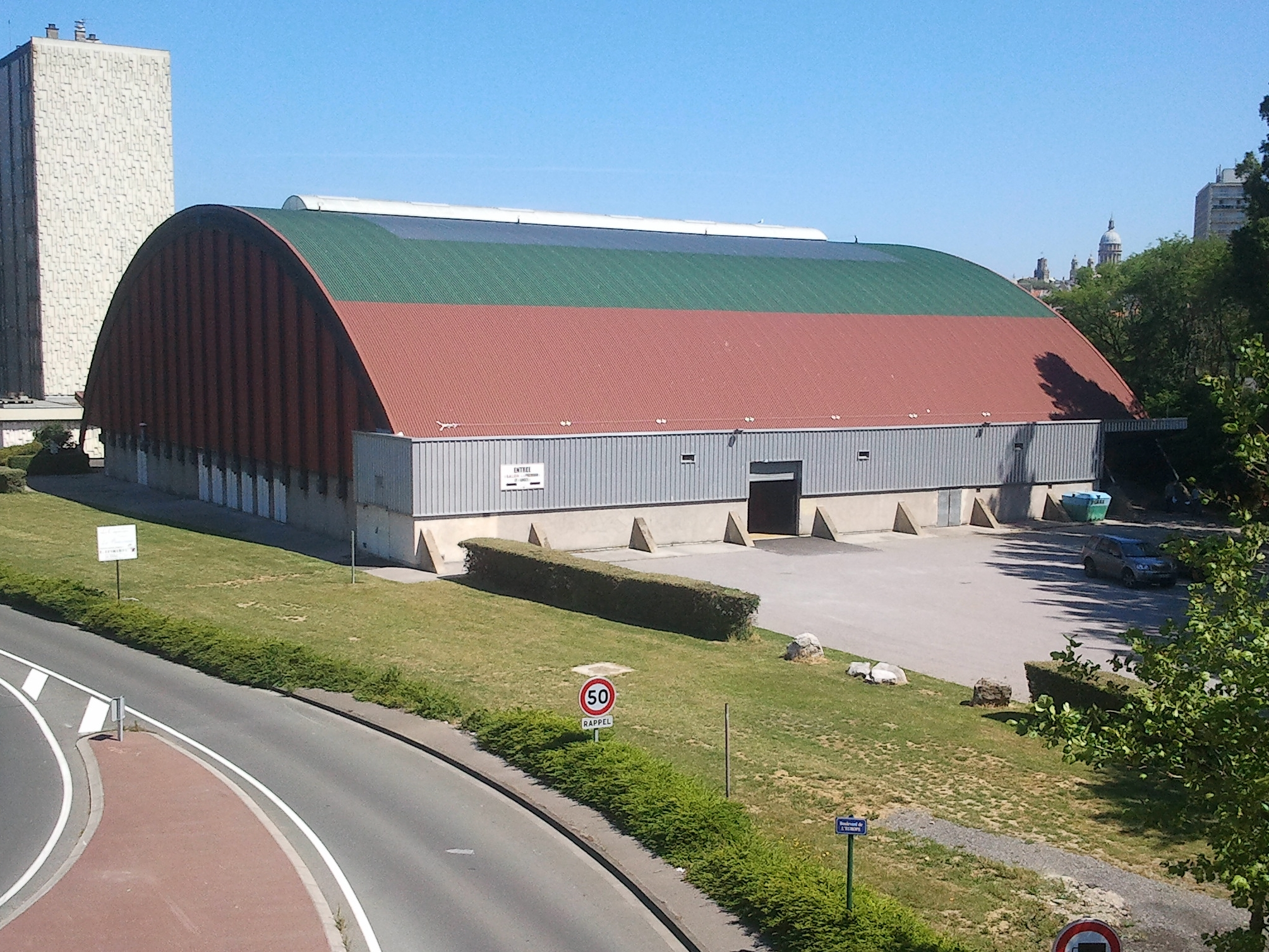 Salle Damrémont de Boulogne-sur-Mer (62) en 2014.